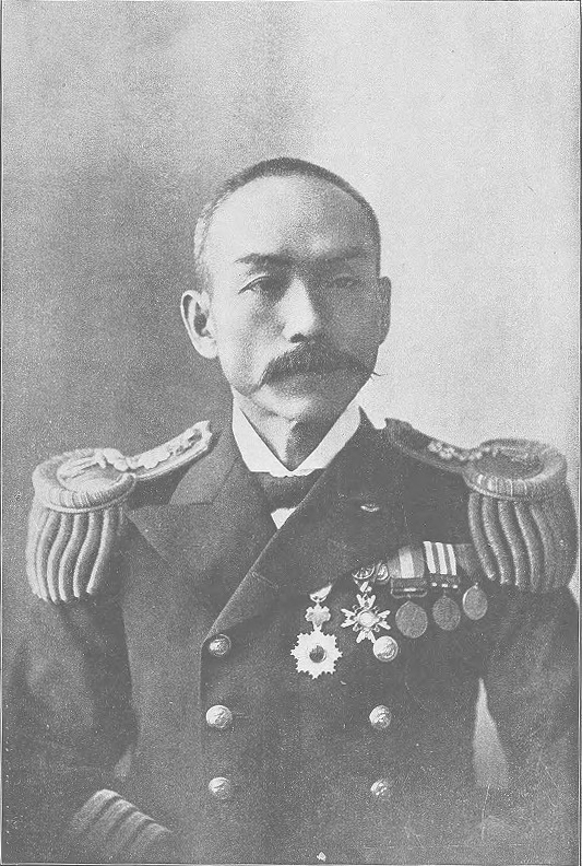 井出麟六海軍少将